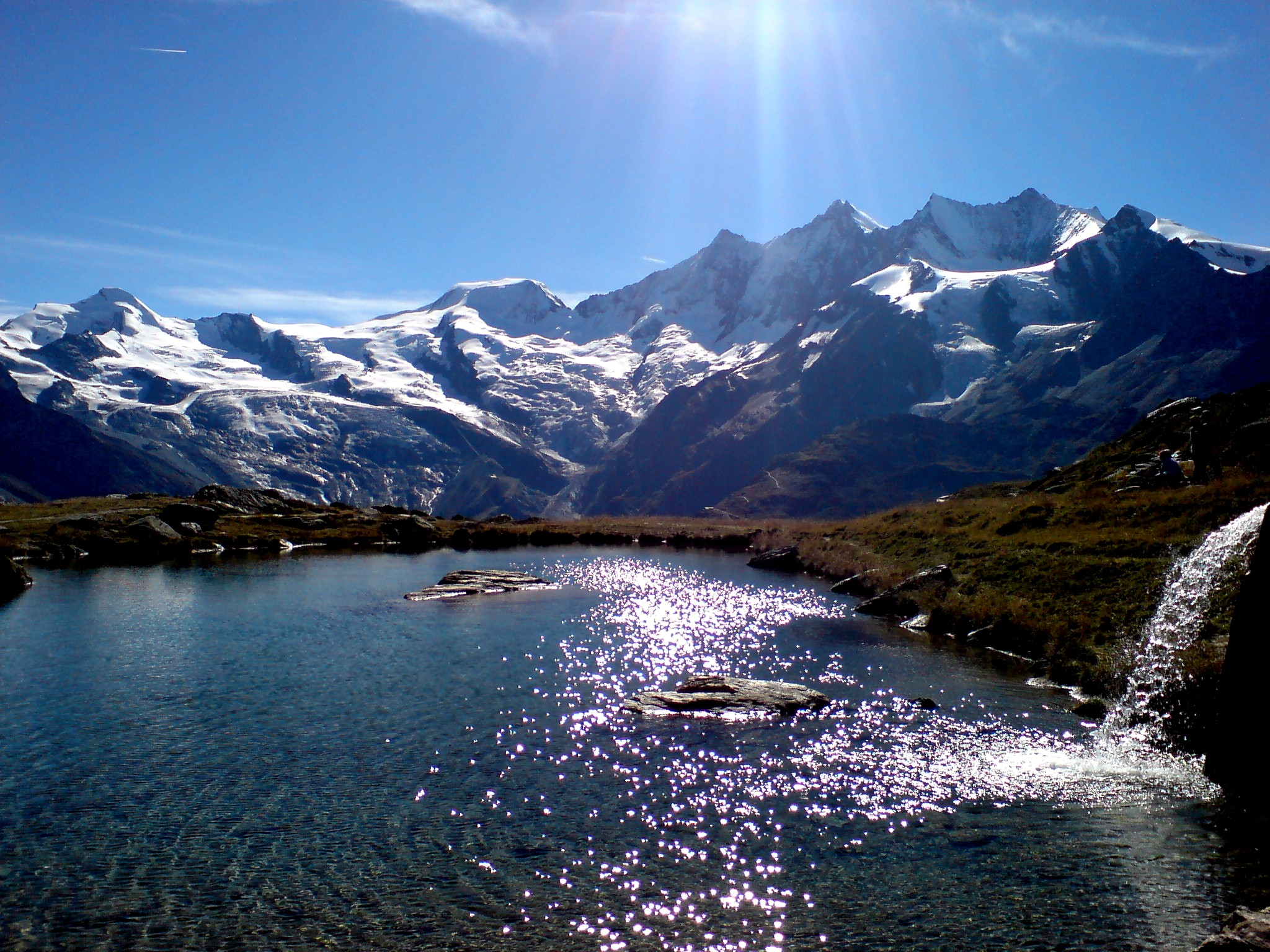 Mischabel range seen from Kreuzboden near Saas Fee